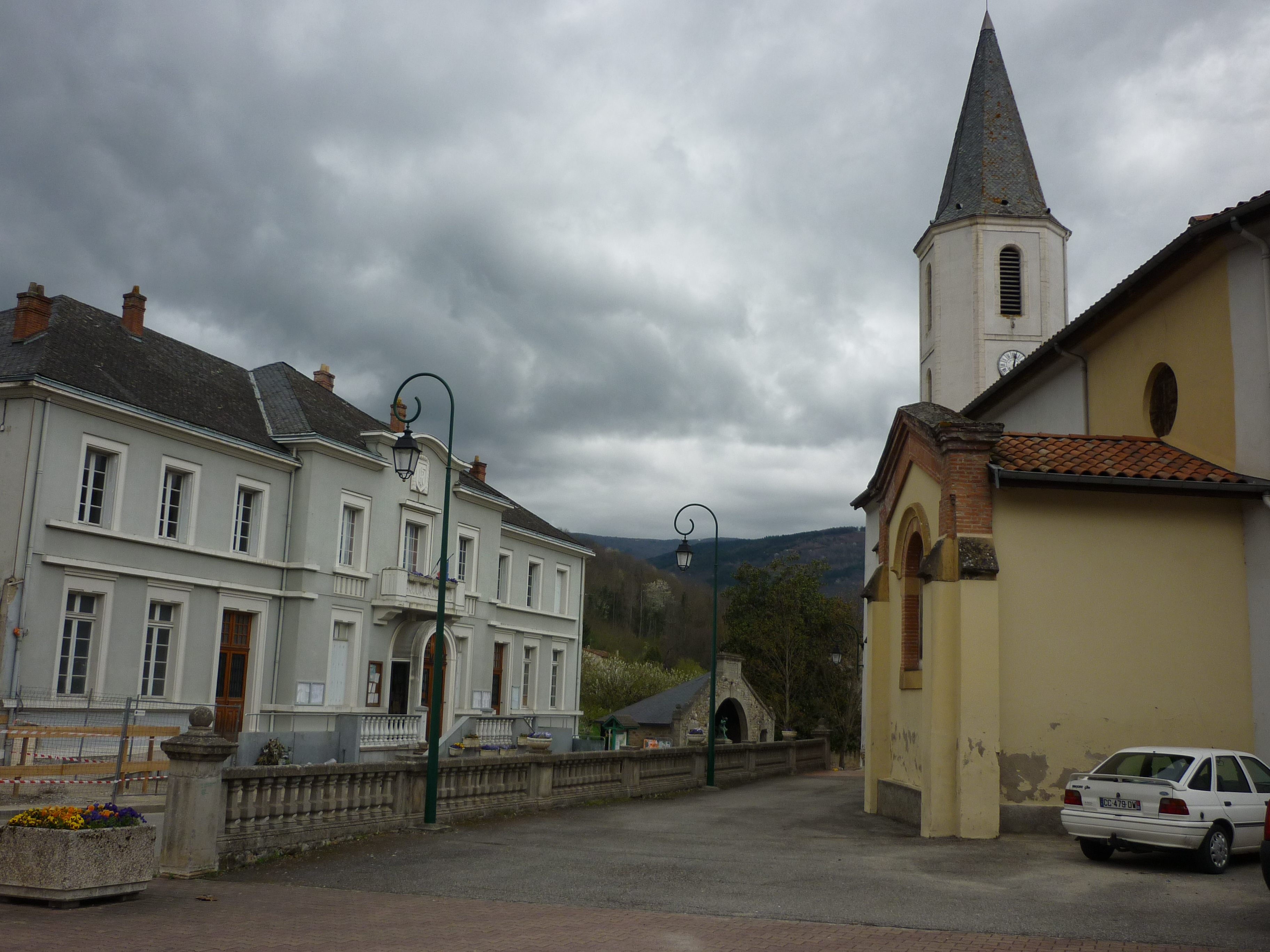 Saint-Paul-de-Jarrat (Ariège) - La mairie et l'église.